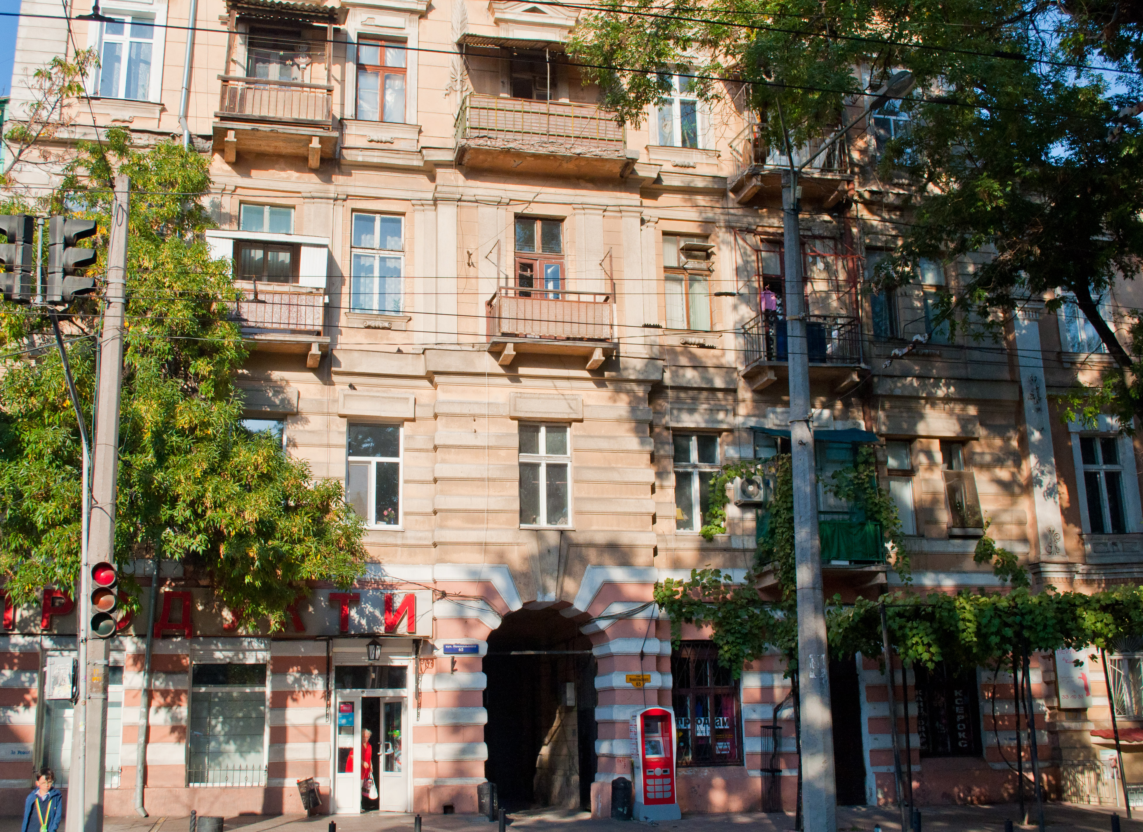 Будинок прибутковий, у якому жили:П.І. Петренко-Критченко - хімік-органік, чл. кор. АН СРСР, професор;Ладислав Зеленка - чеський віолончалист і педагог, нар.арт. ЧРСР, професор;Франтішек Ступка - чеський скрипаль, диригент і педагог, засл. артист УРСР професор;Ярослав Коціан - чеський скрипаль, педагог і композитор.